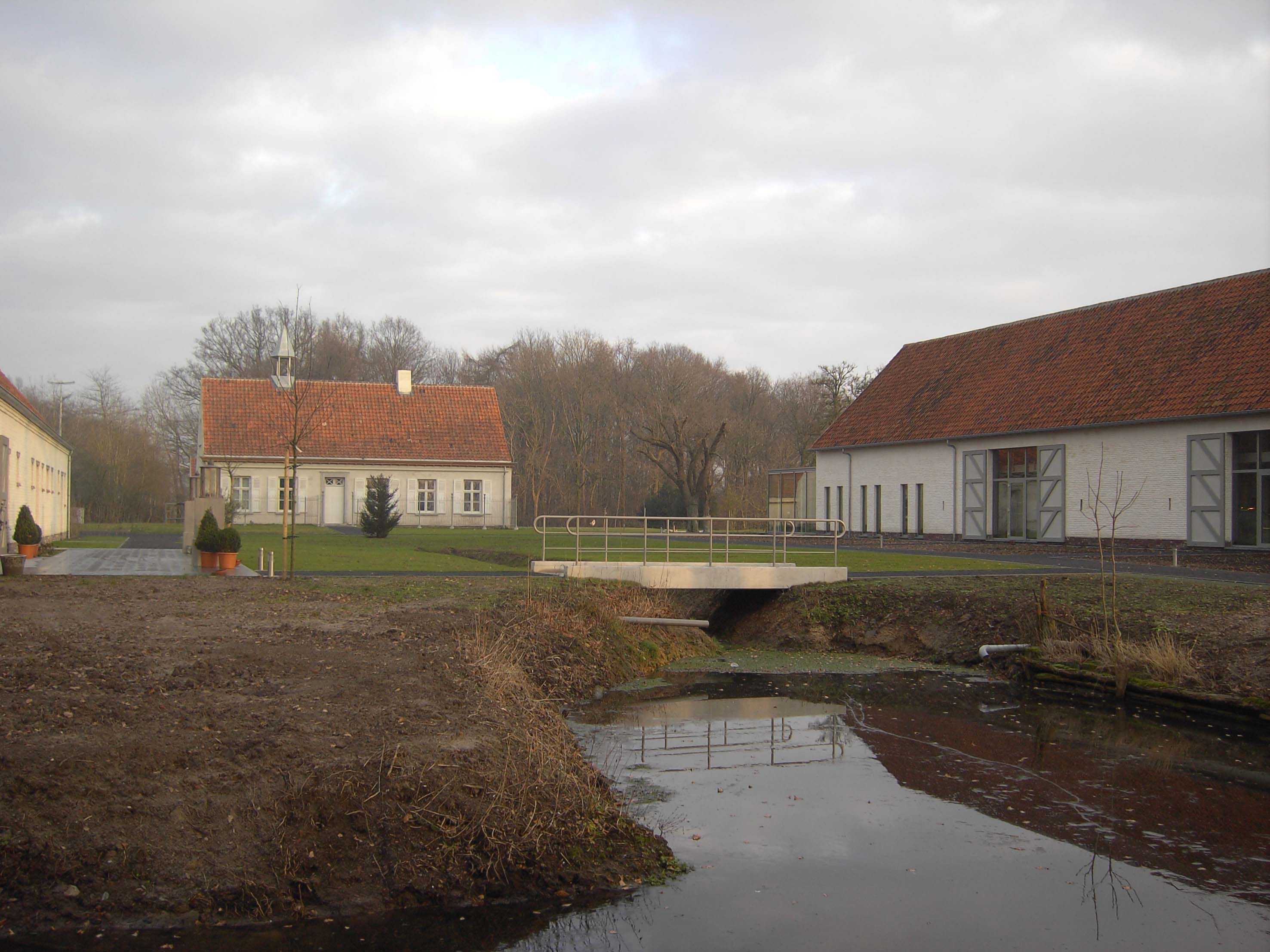 Kleit (Maldegem - Belgium). Historische abdijhoeve Papinglo. De gebouwen uit 1756 werden in 2007 gerestaureerd.